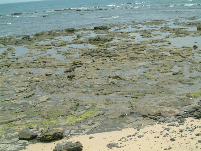 澎湖縣湖西鄉龍門海岸地形。